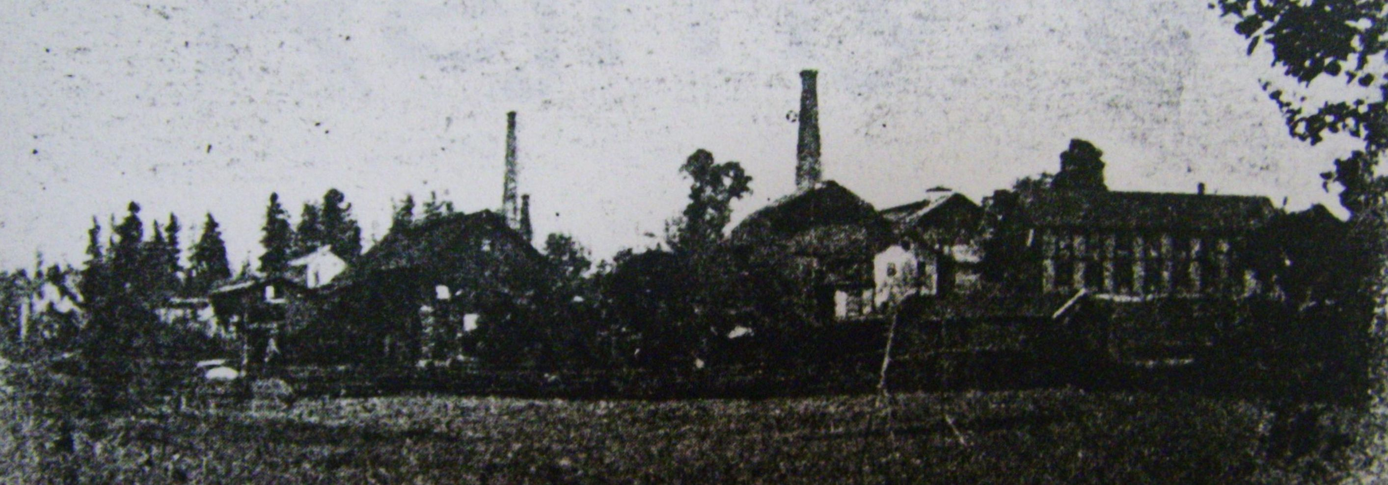 Ausblick auf die Glashütte in Reijmyre